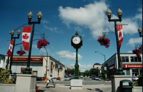 Oakville Plaza im Stadtzentrum